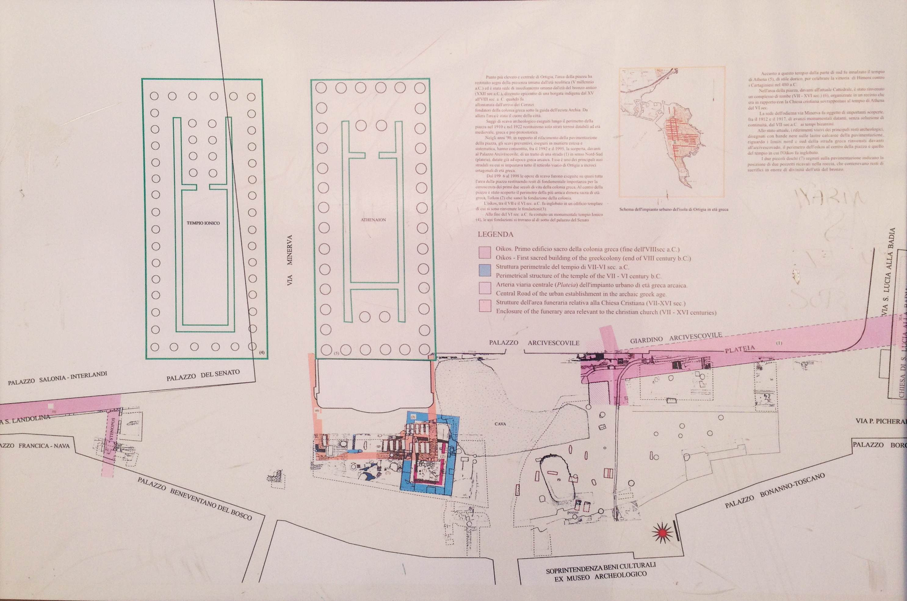 Rinvenimenti archeologici piazza duomo